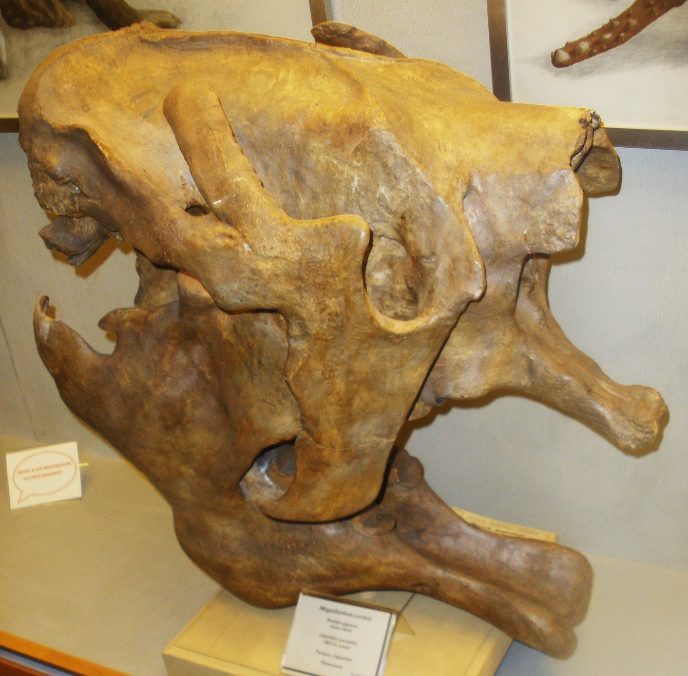 Fossil of Megatherium, an extinct mammal- Took the picture at Museo di Paleontologia di Firenze